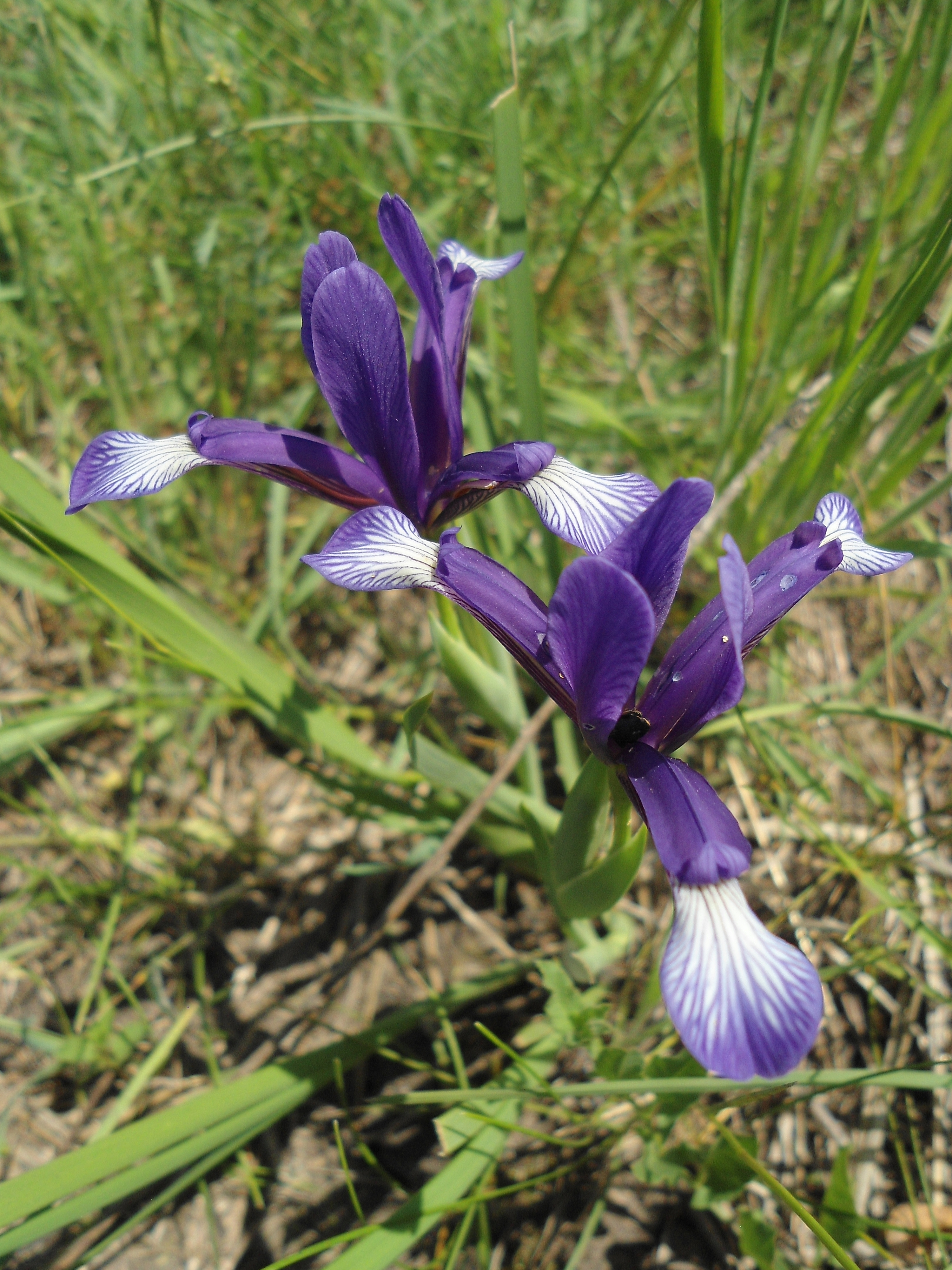 Перуники от вида Iris sintenisii.